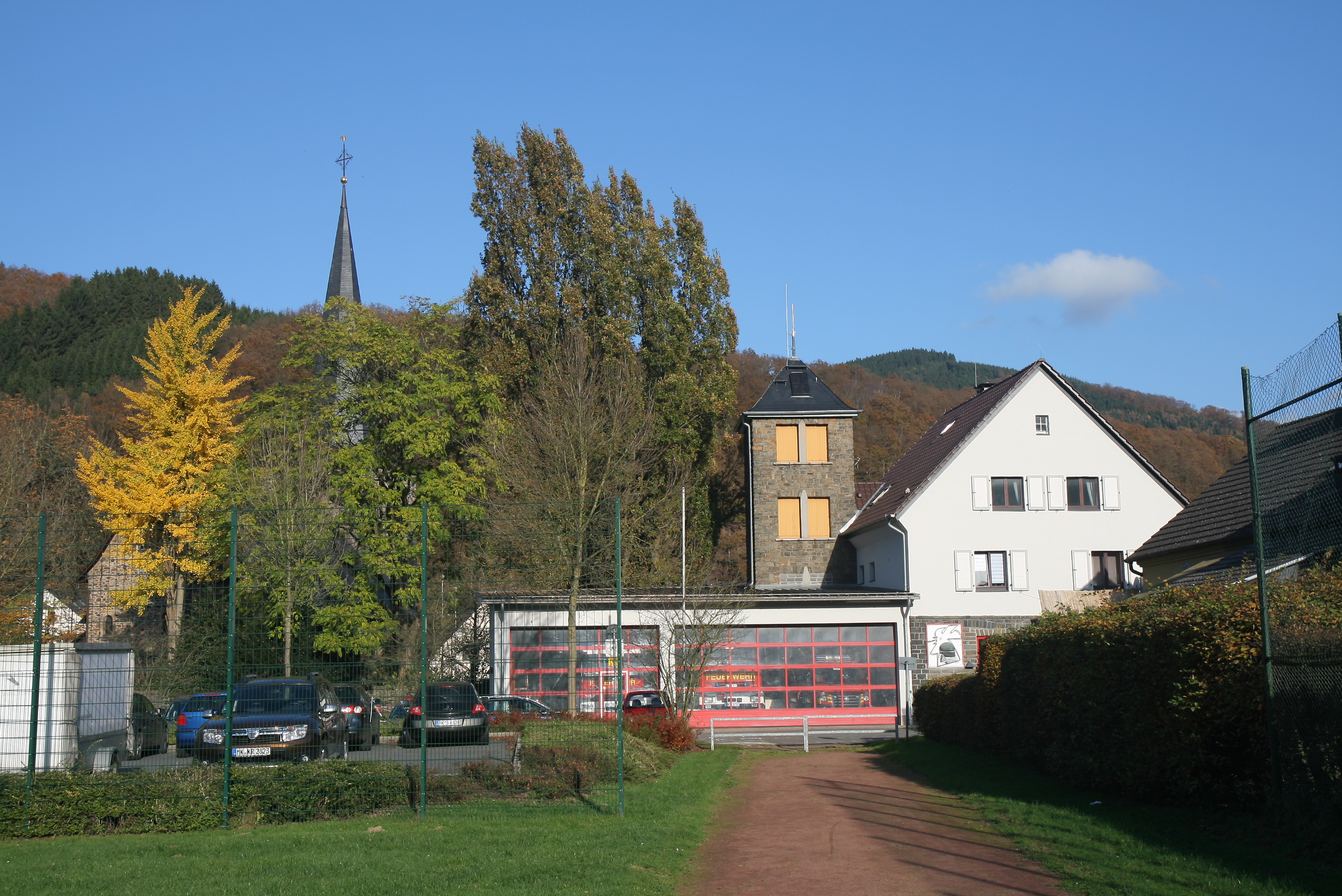 Gebäude der Freiwilligen Feuerwehr Ohle in Plettenberg, Friedrich-Mayweg-Straße. Im Hintergrund der Turm der evangelischen Kirche Ohle.